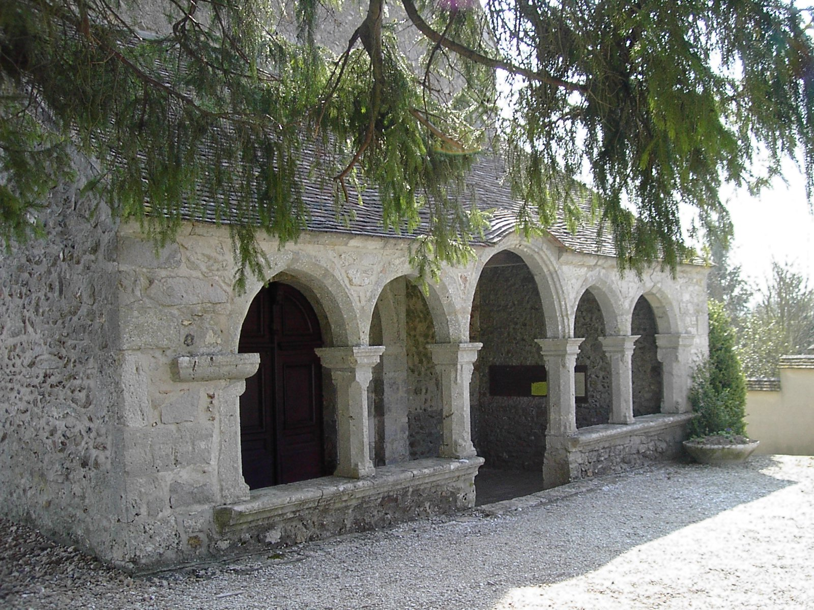 Église Saint-Pierre de Rozoy-le-Vieil (Classée)